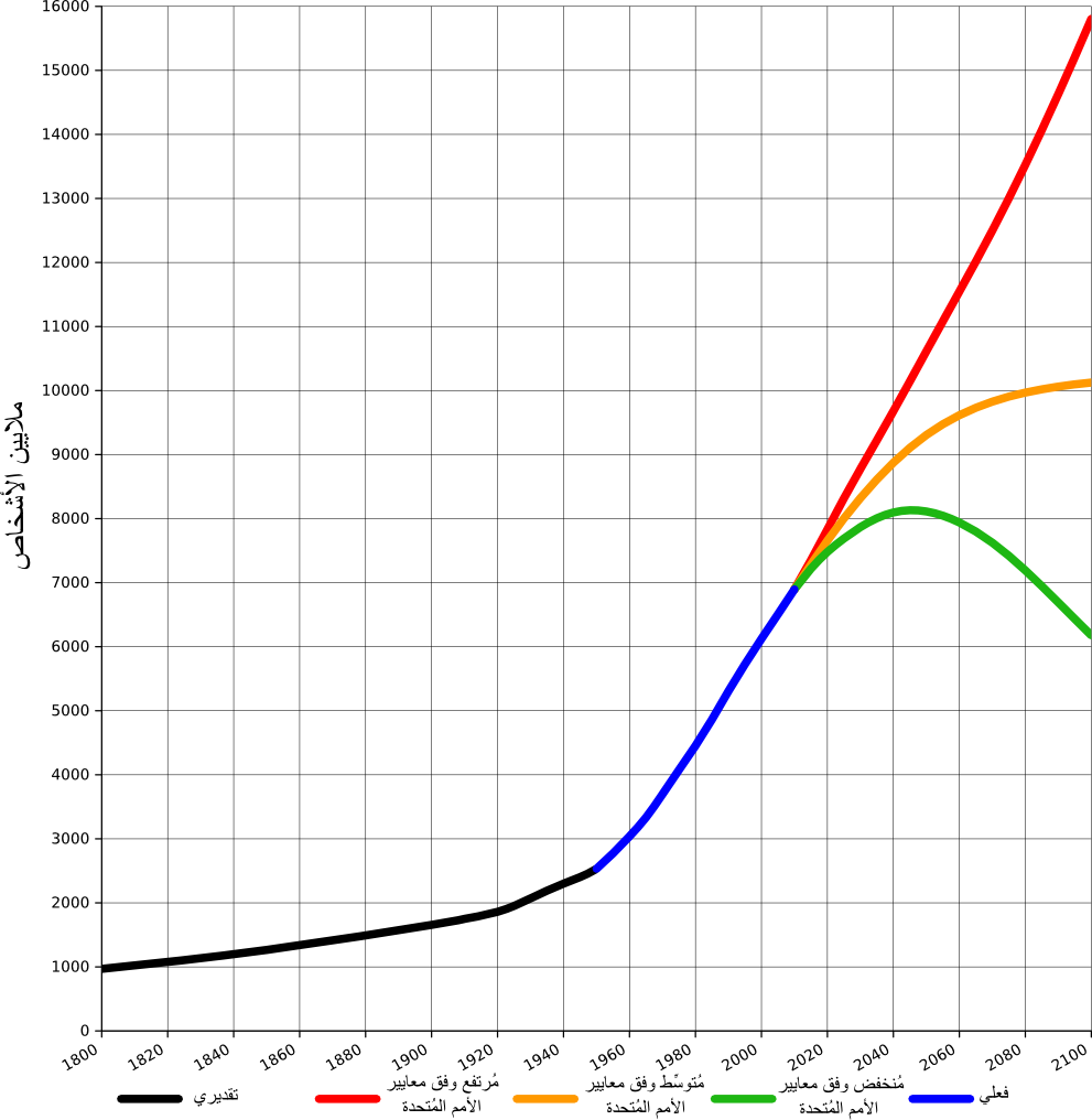 تعداد سُكَّان العالم مُنذ سنة 1800 حتَّى سنة 2100، استنادًا على إحصاءٍ من سنة 2004 أنجزته الأُمم المُتحدة، وعلى تقديرات مكتب إحصاءات الولايات المُتحدة.